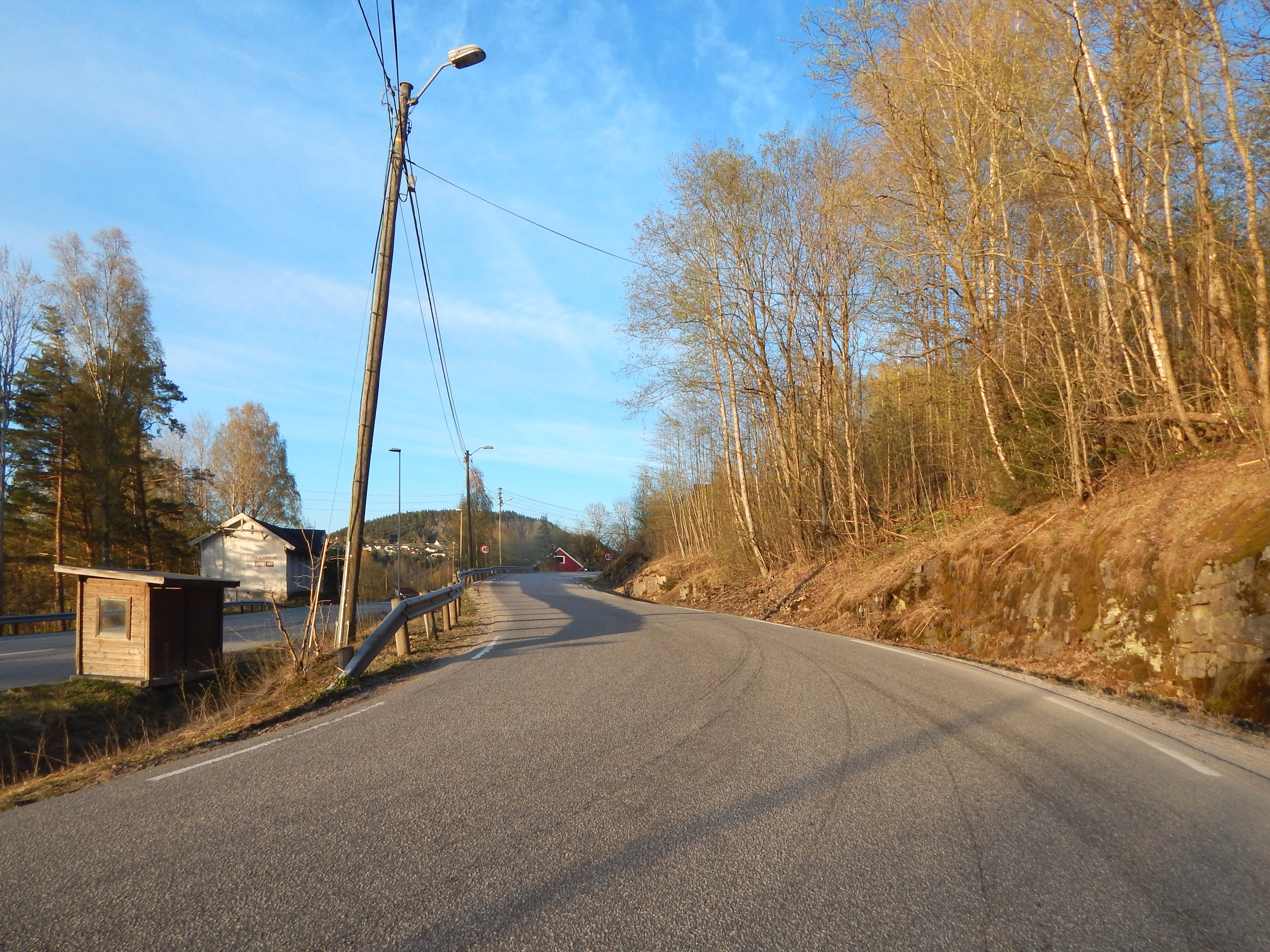 Klovholtvegen (fylkesvei 51) der den tar av fra Ulefossvegen (riksvei 36).